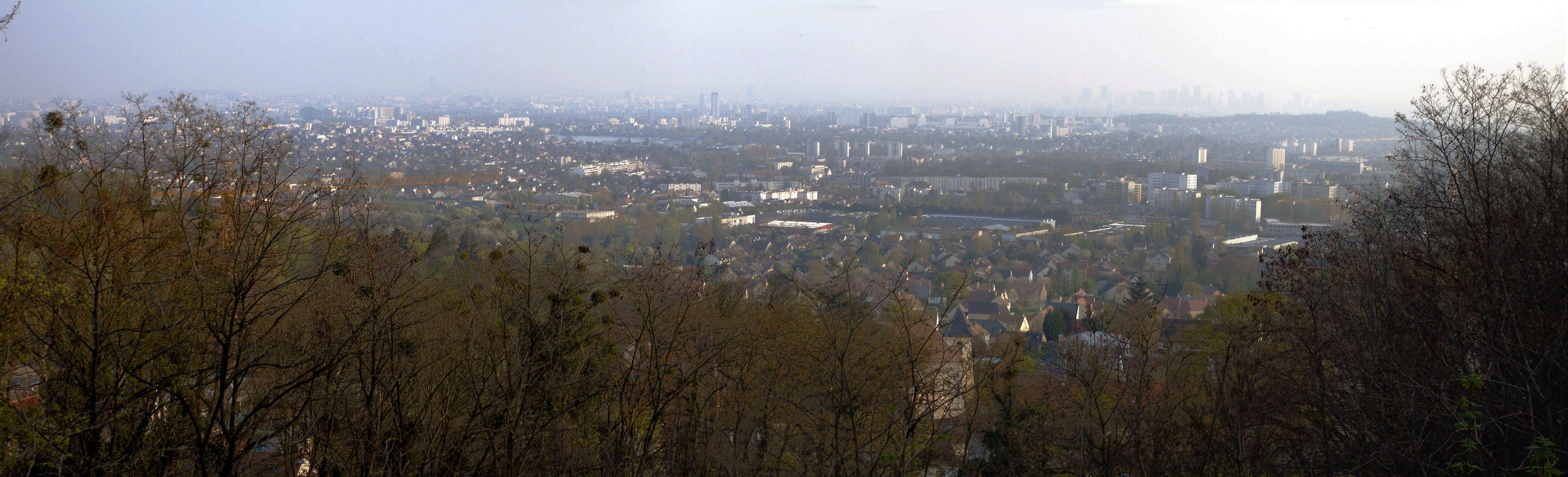 Vue panoramique de la vallée de Montmorency et Paris prise de la terrasse des châtaigniers à Andilly (Val-d'Oise), France